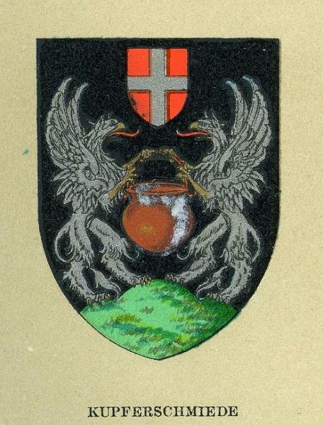 Wappen der Kupferschmiede (Wappen der Wiener Gewerbegenossenschaften, um 1900)